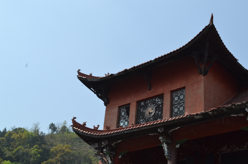 中文（中国大陆）: 大有宫一角